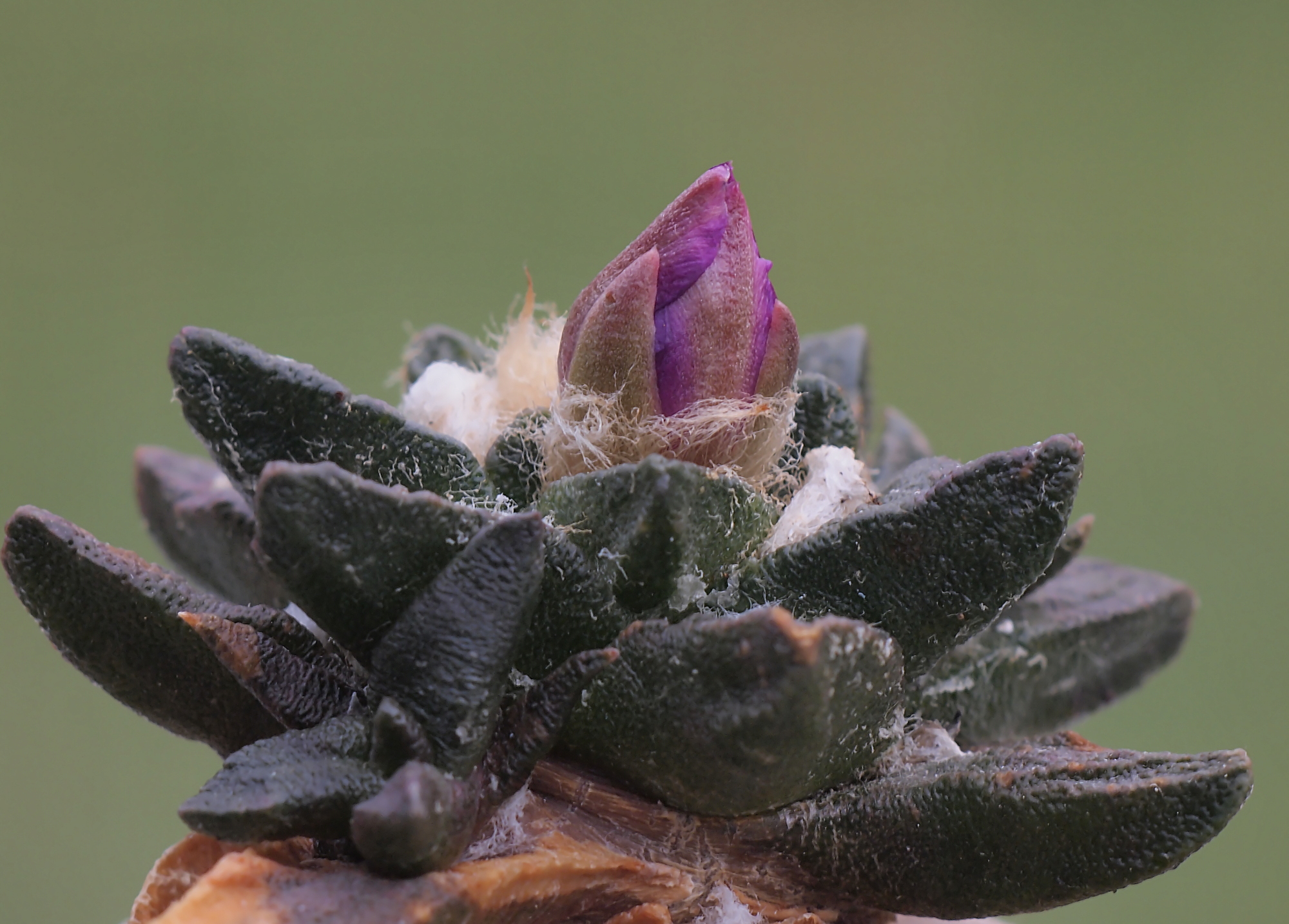 Ariocarpus scapharostrus